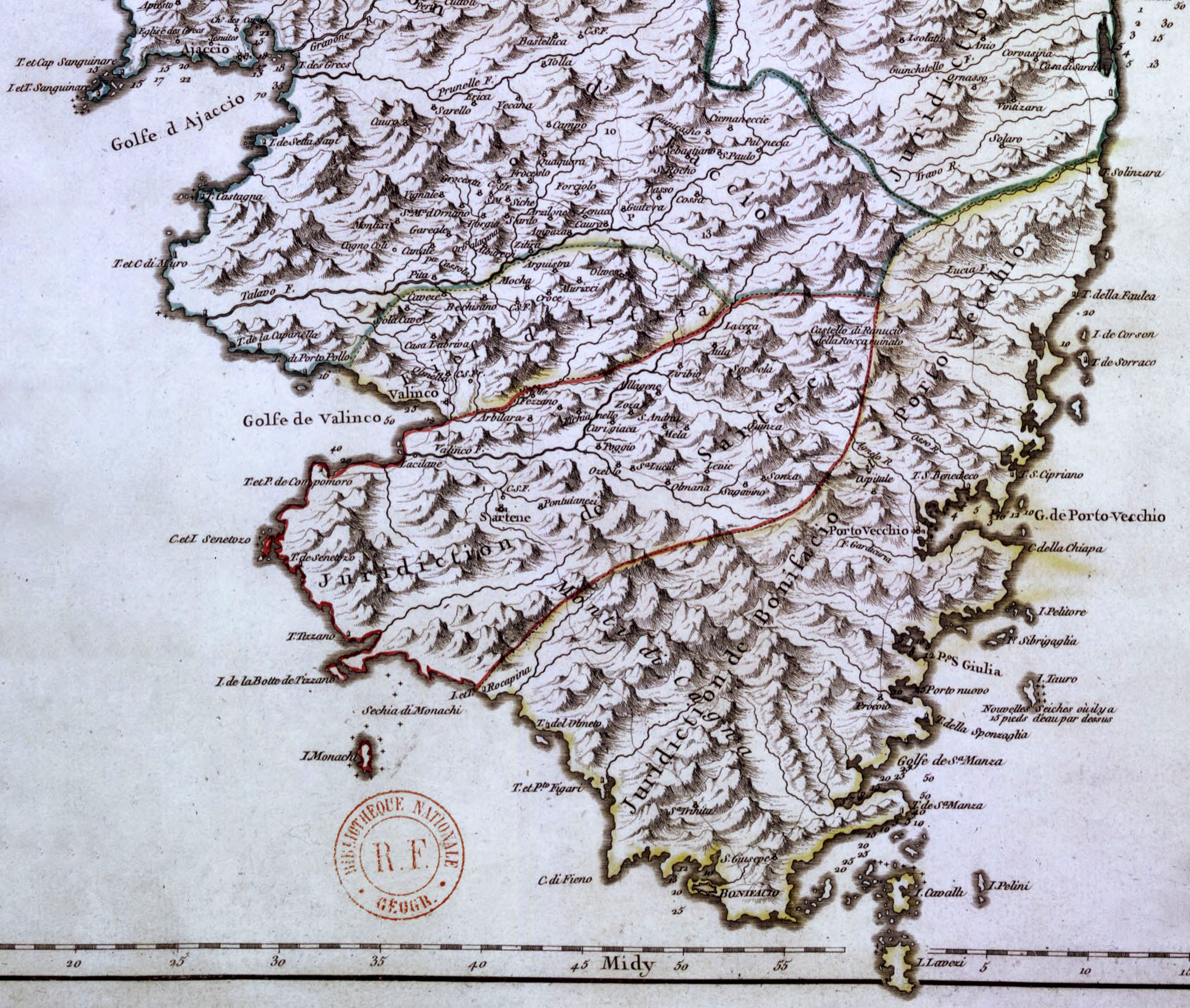 La juridiction de Bonifacio Porto-Vecchio sur la carte nouvelle de l'Isle de Corse divisée par ses dix provinces ou juridictions, par Gilles Robert de Vaugondy